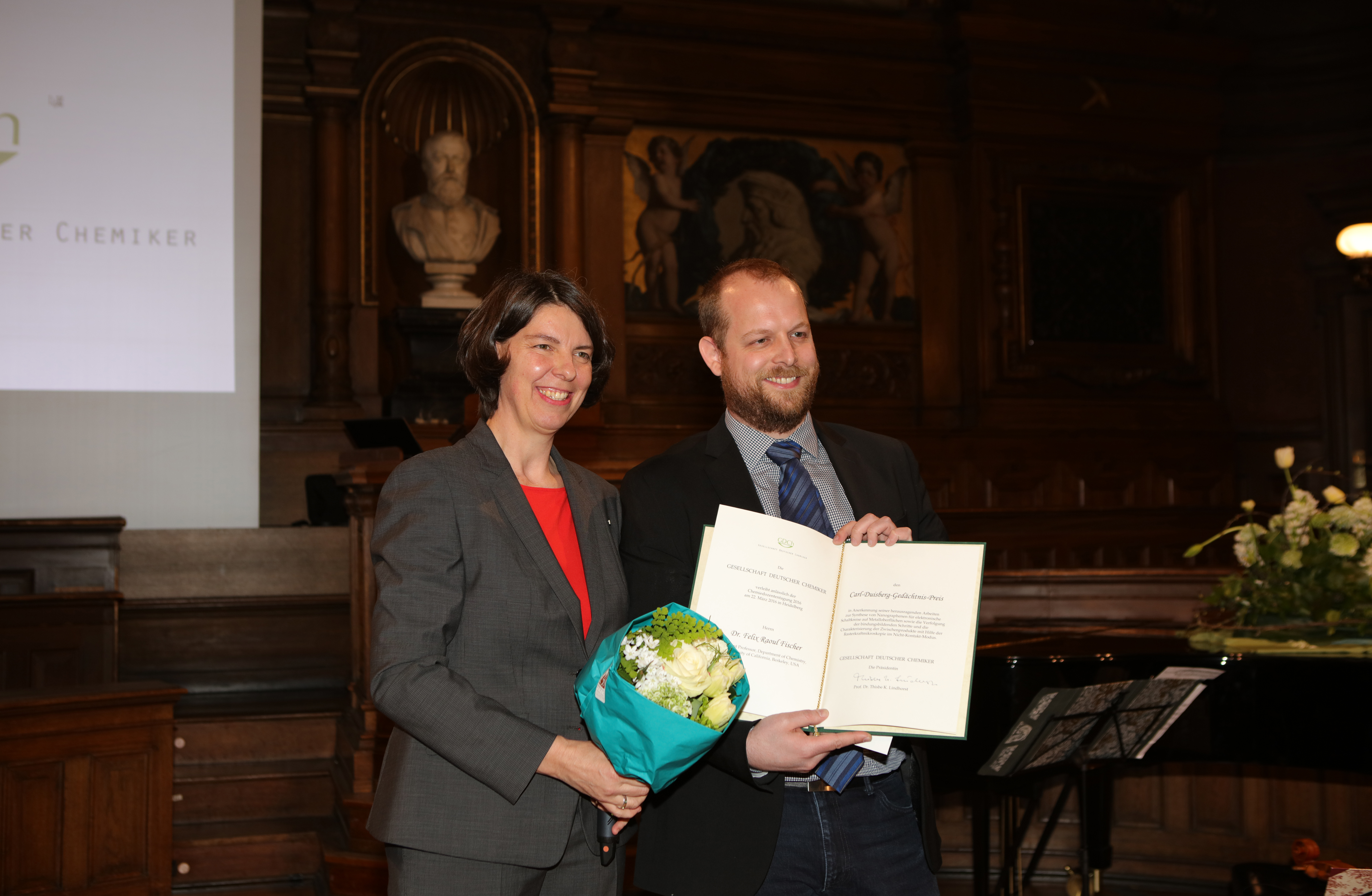 Frau Prof. Dr. Thisbe Lindhorst (Präsidentin der Gesellschaft Deutscher Chemiker 2016/17) verleiht Prof. Dr. Felix Raoul Fischer (University of California, Berkeley/USA) den Carl-Duisberg-Gedächtnispreis auf der Chemiedozententagung am 22. März 2016 in der alten Aula, Ruprecht-Karls-Universität Heidelberg, Grabenstraße 1, 69117 Heidelberg/Deutschland.